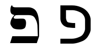 hebrew letter pe